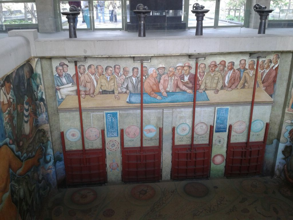 en esta imagen se pueden apreciar las compuertas del acueducto; también se logra ver que aparece el ingeniero Eduardo Molina; diseñador del acueducto.